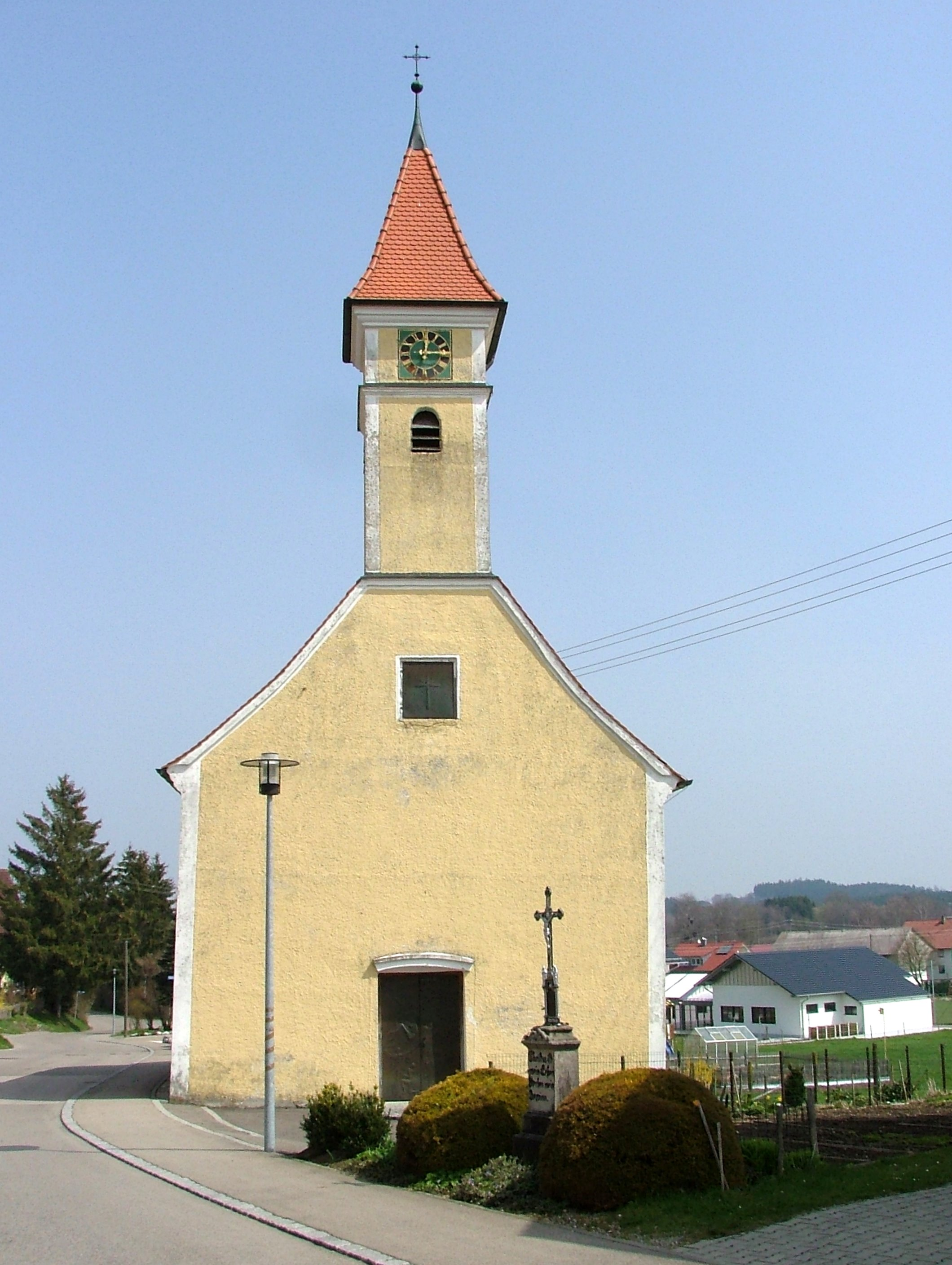 Eichenberg